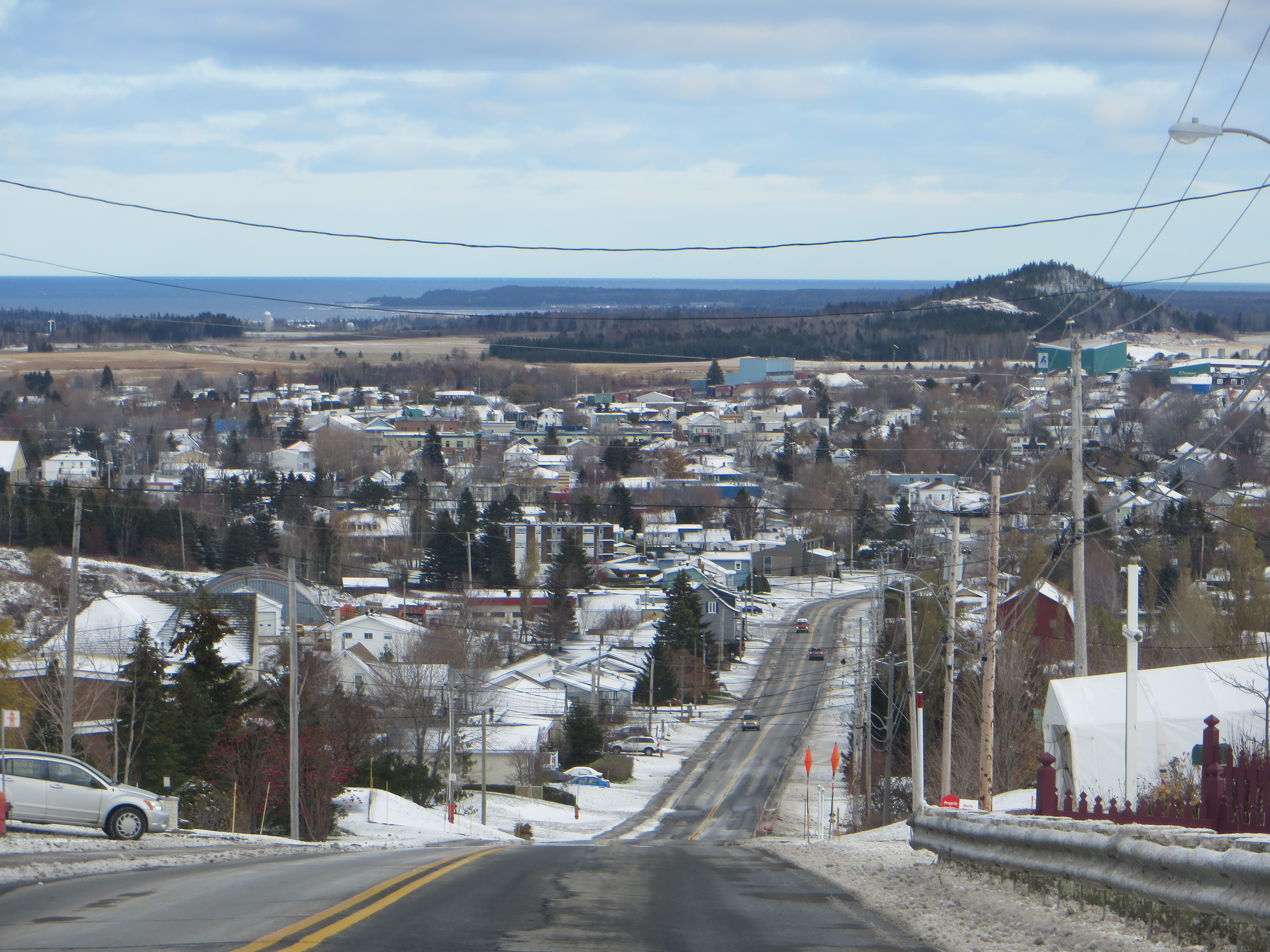 Vista de Mont-Joli.